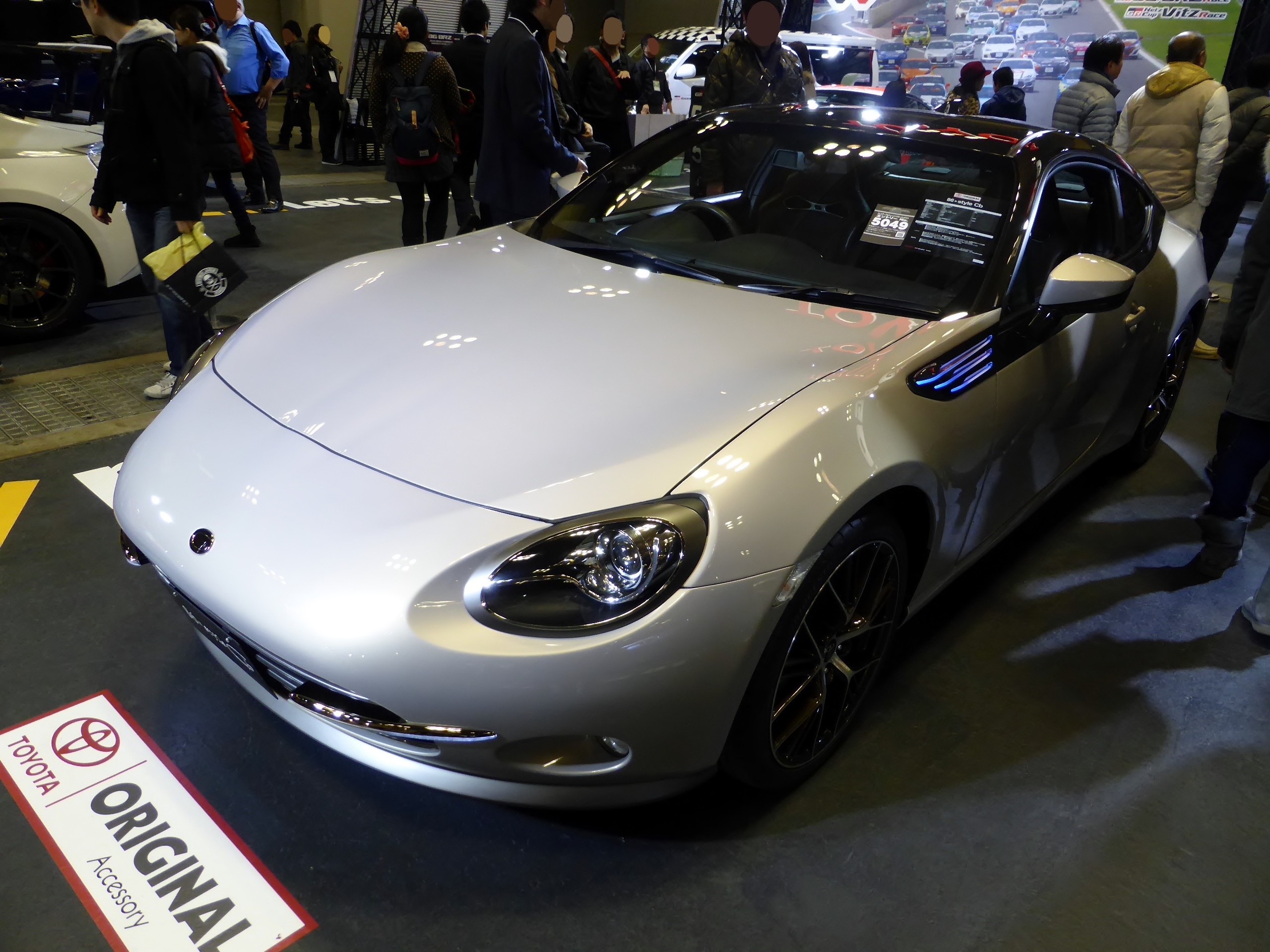 大阪オートメッセ2014においてトヨタ・86×Style Cbを撮影。